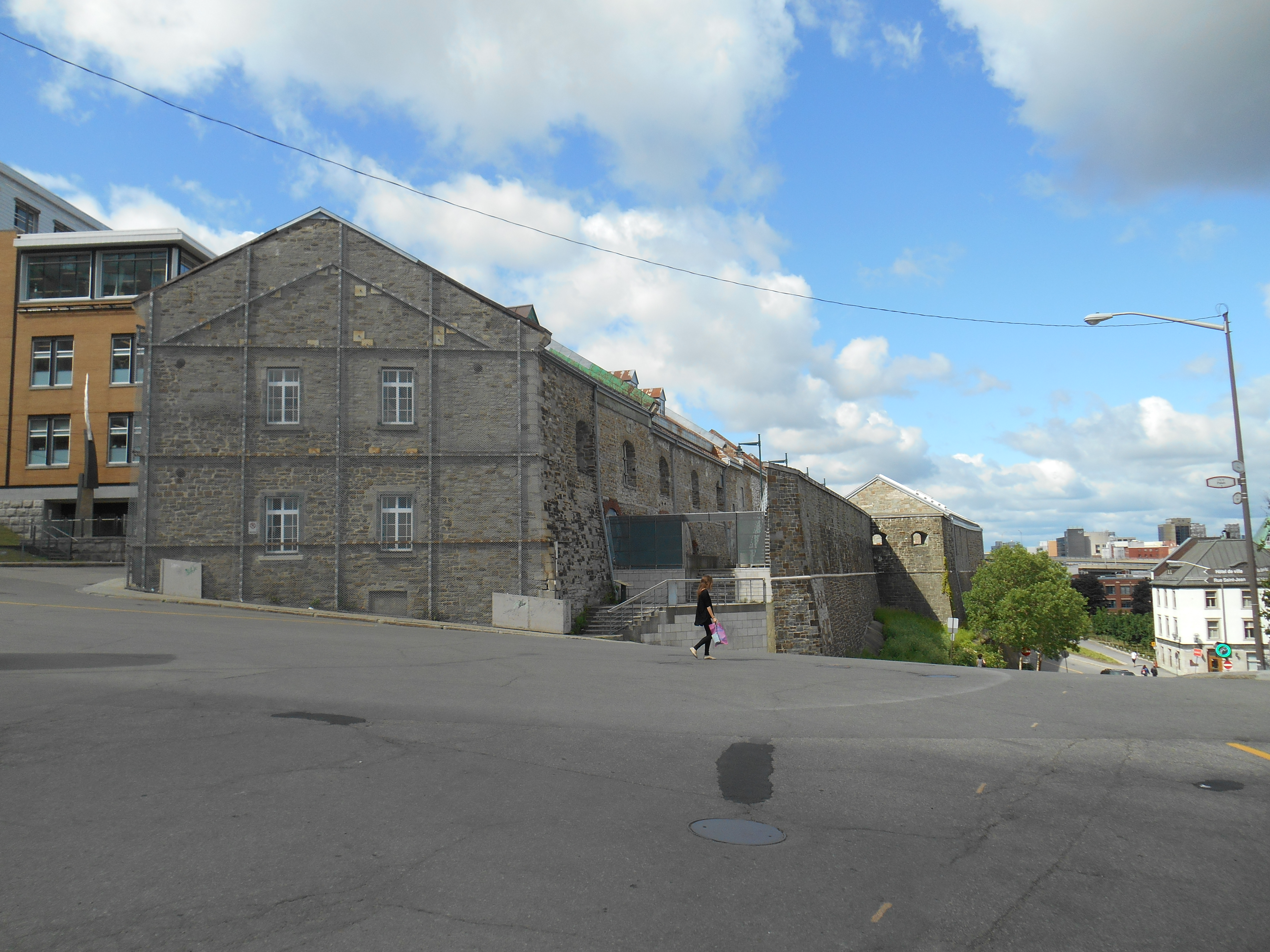 « Les Nouvelles-Casernes constituent un ouvrage militaire érigé de 1749 à 1752 et dont certaines parties ont été reconstruites au cours du XIXe siècle et au début du XXe siècle. Le bâtiment en pierre comprend sept sections et présente un plan en parallélogramme allongé. Les différentes sections, séparées par des murs coupe-feu, ont des élévations de deux étages à deux étages et demi et sont coiffées de toits à deux versants droits ou plats. Le bâtiment est implanté sur le coteau de la Potasse, le long des fortifications, dans le parc de l'Artillerie, dans l'arrondissement de La Cité-Limoilou de la ville de Québec. »